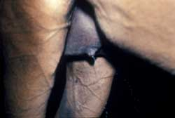 Milk streaming from mare's udder.